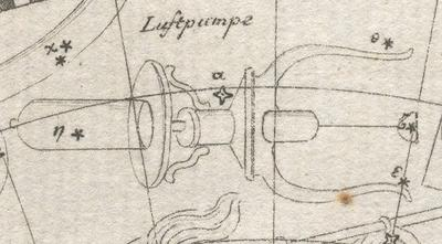 Sternbild Luftpumpe, Stich von 1782 - Ausschnitt aus Tafel XXIX (Die Südlichen Gestirne nach de la Caille / Daniel Berger [Kupferstecher]) aus "Vorstellung der Gestirne auf XXXIV Kupfertafeln nach der Pariser Ausgabe des Flamsteadschen Himmelsatlas : Nebst einer Anweisung zum Gebrauch und einem Vollständigen Sternenverzeichnis"; Bode, Johann Elert; Berlin [u.a.]; 1782